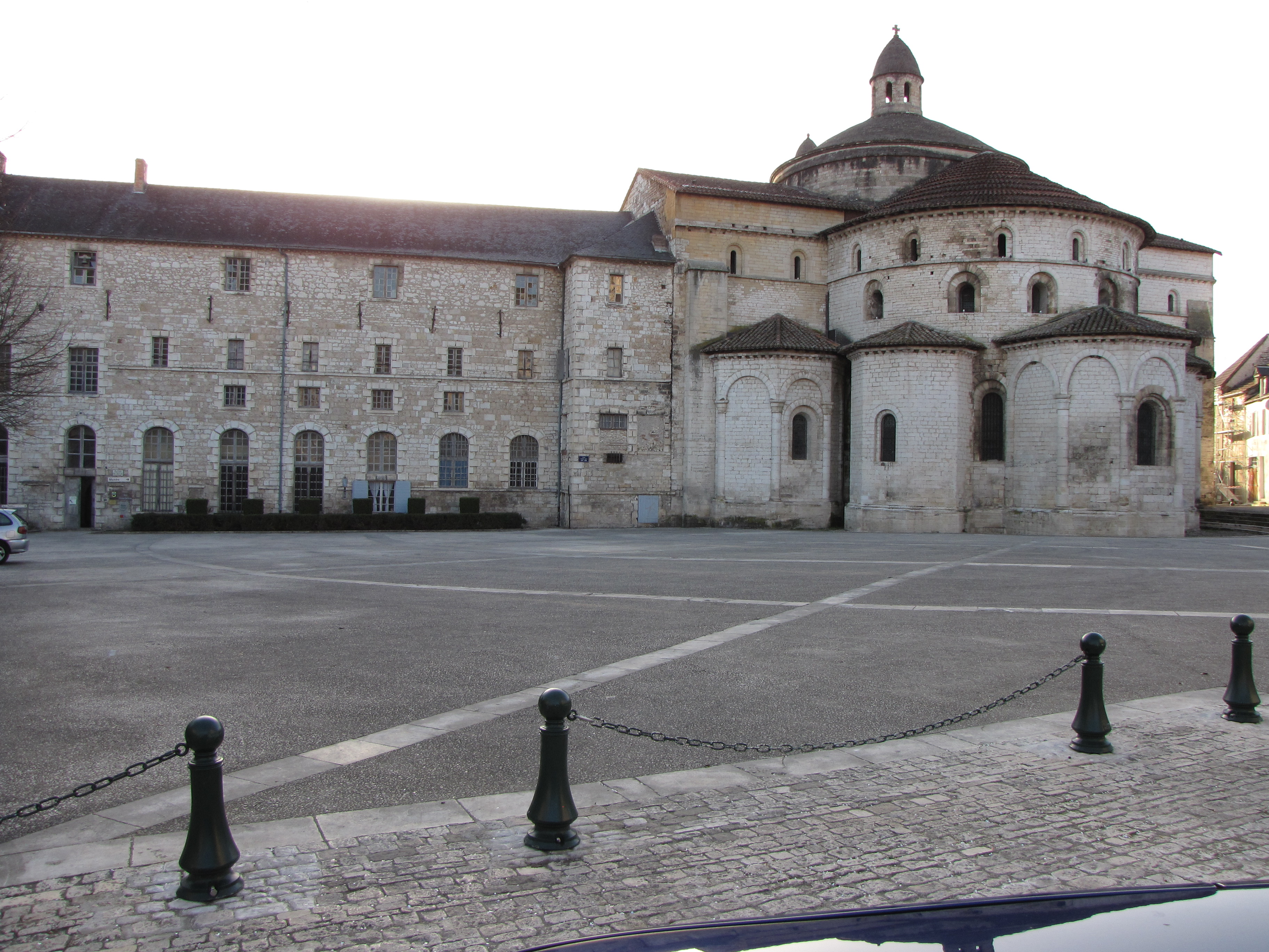 Abbatiale Sainte Marie de Souillac, vue depuis l'Est. Le long bâtiment à gauche fait partie de l'ancienne abbaye.